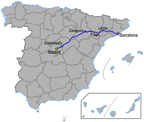 Mapa de la autovía A2